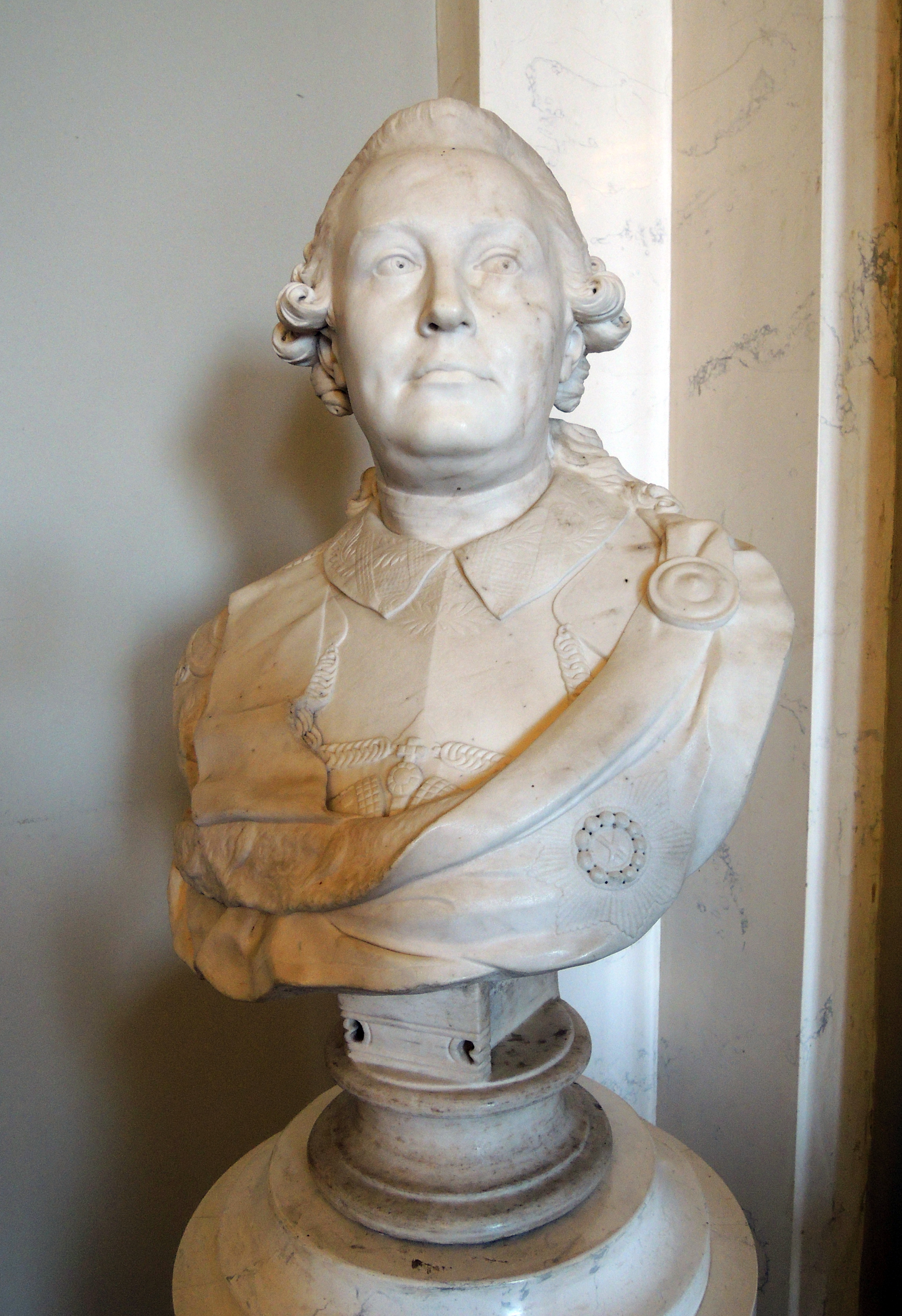 Ф. Шубин. «Портрет Г. Г. Орлова», 1773, ГРМ